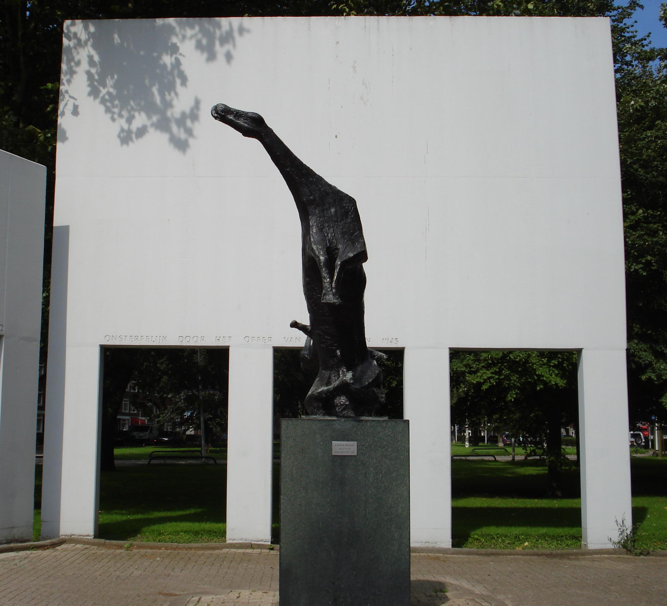 Rotterdam, Pleinweg/Mijnsherenlaan. Kunstwerk "Il Grande Miracolo" (1953) van Marino Marini. Rotterdam/The Netherlands. Het is geplaatst ter nagedachtenis aan het doodschieten op 12 maart 1945 van 40 mensen als wraakaktie door de bezetters in oorlog 1940/1945. Onderzoek uit 2007/2008 bracht aan het licht dat er drie agenten bij waren en dat in het executiepeloton zeven Nederlandse agenten waren opgenomen, die Duitse uniformen hadden aangetrokken. [1] De lokatie klopt echter niet, die was 200 meter zuidelijker, recht tegenover het eerste huizenblok op de hoek van de Goereesestraat. Op de plaats waar anno 2008 een gebouw staat. Op de binnenplaats van dat gebouw stond/staat ook nog een kleiner gedenkteken. ↑ NRC 23 april 2008